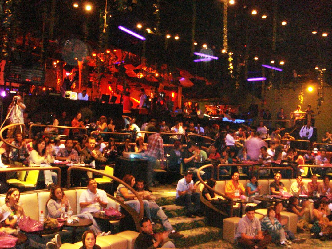 Esquina Norte 2007 en Tangaloo